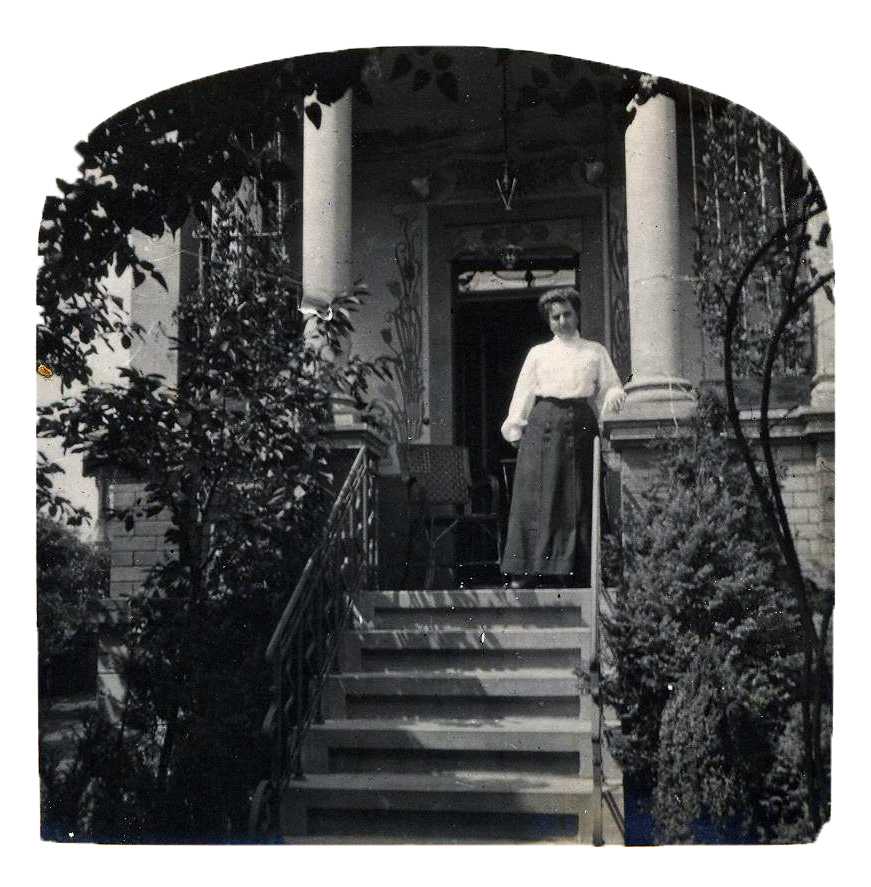 Foto de Aurelie Elb, edzino de Leopold Elb, germana esperantistino ĉe la enirejo de sia domo en Kötzschenbroda, Blumenstraße 12.